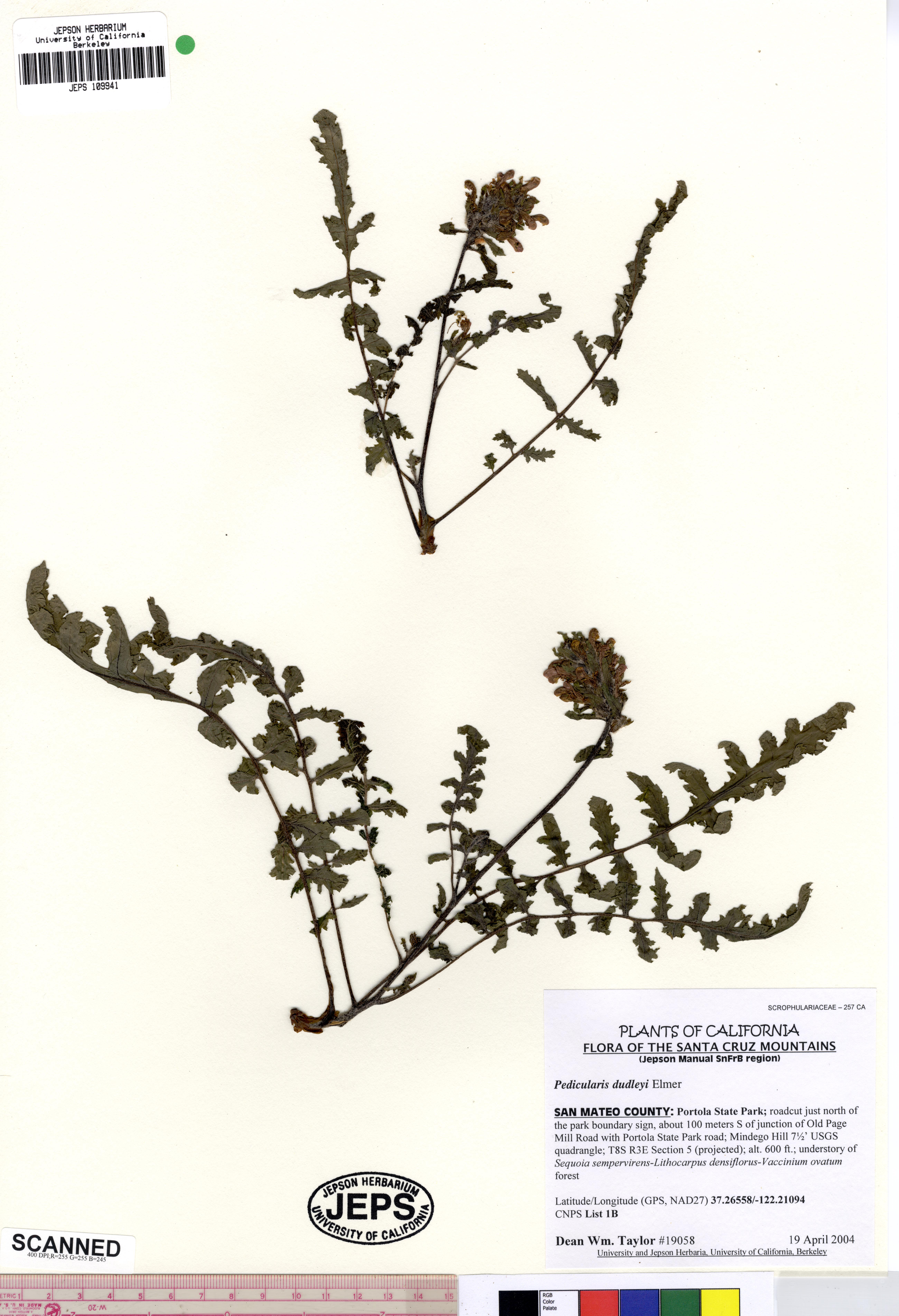 Pedicularis dudleyi JEPS109941